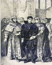 Eugène Delacroix (1834): Hamlet, I, 2 - The queen consoles Hamlet.